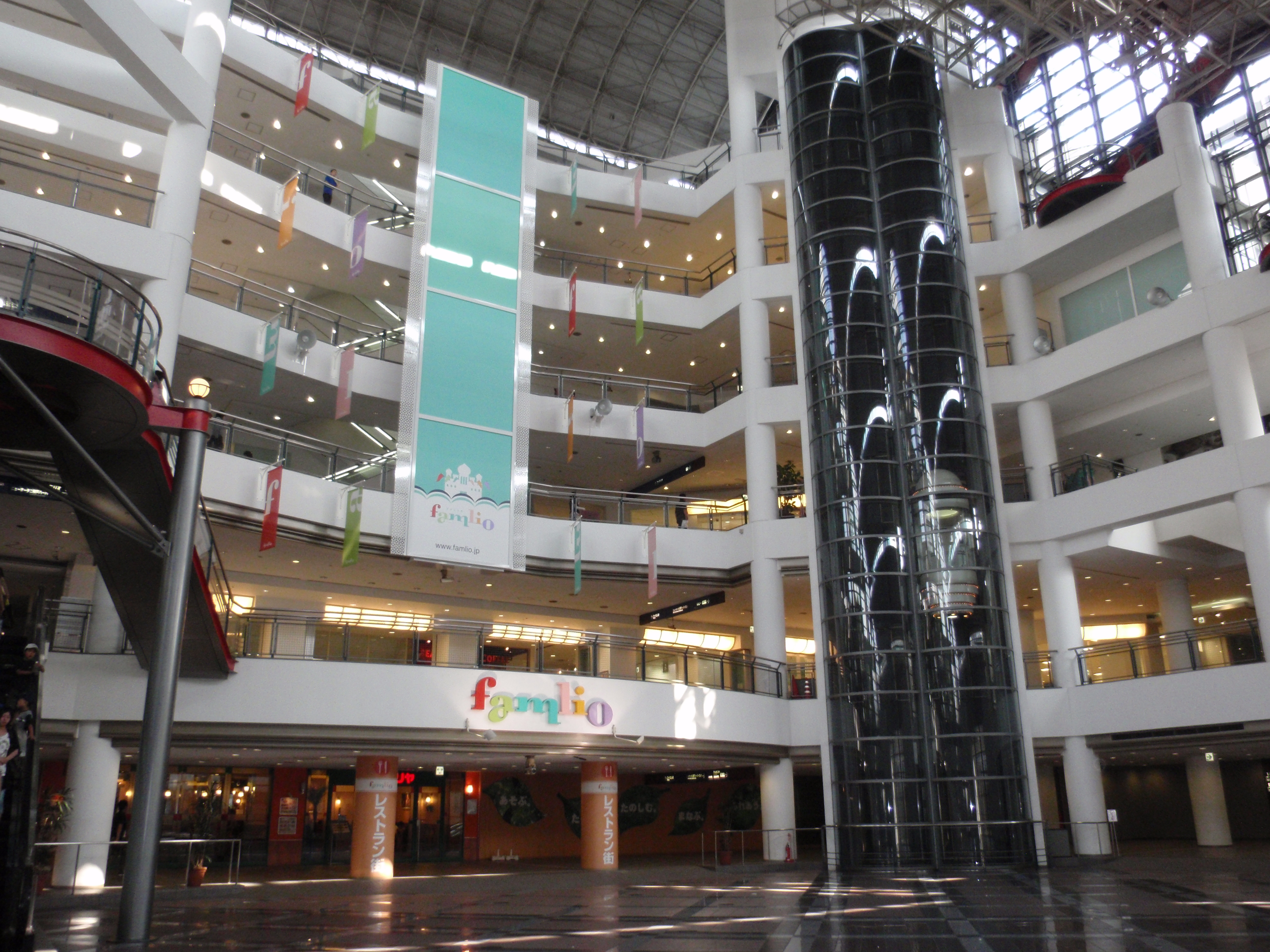 ファミリオ内部